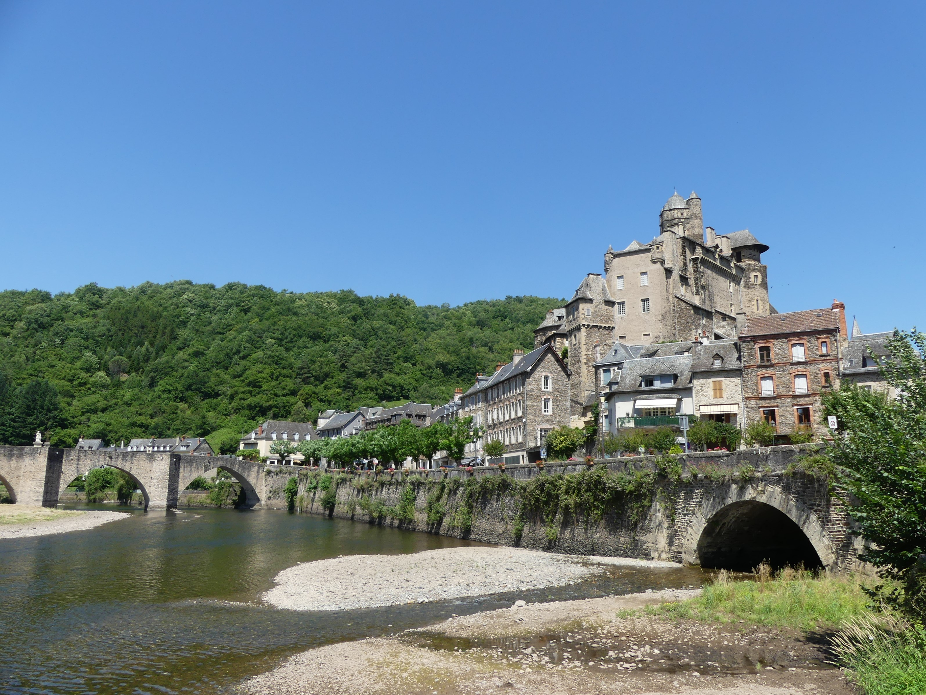 Le confluent de la Coussane (qui arrive de la droite) et du Lot, à Estaing, Aveyron, France.